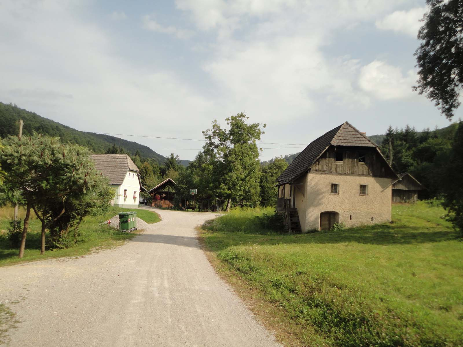 Stare Žage: stare kočevarske hiše